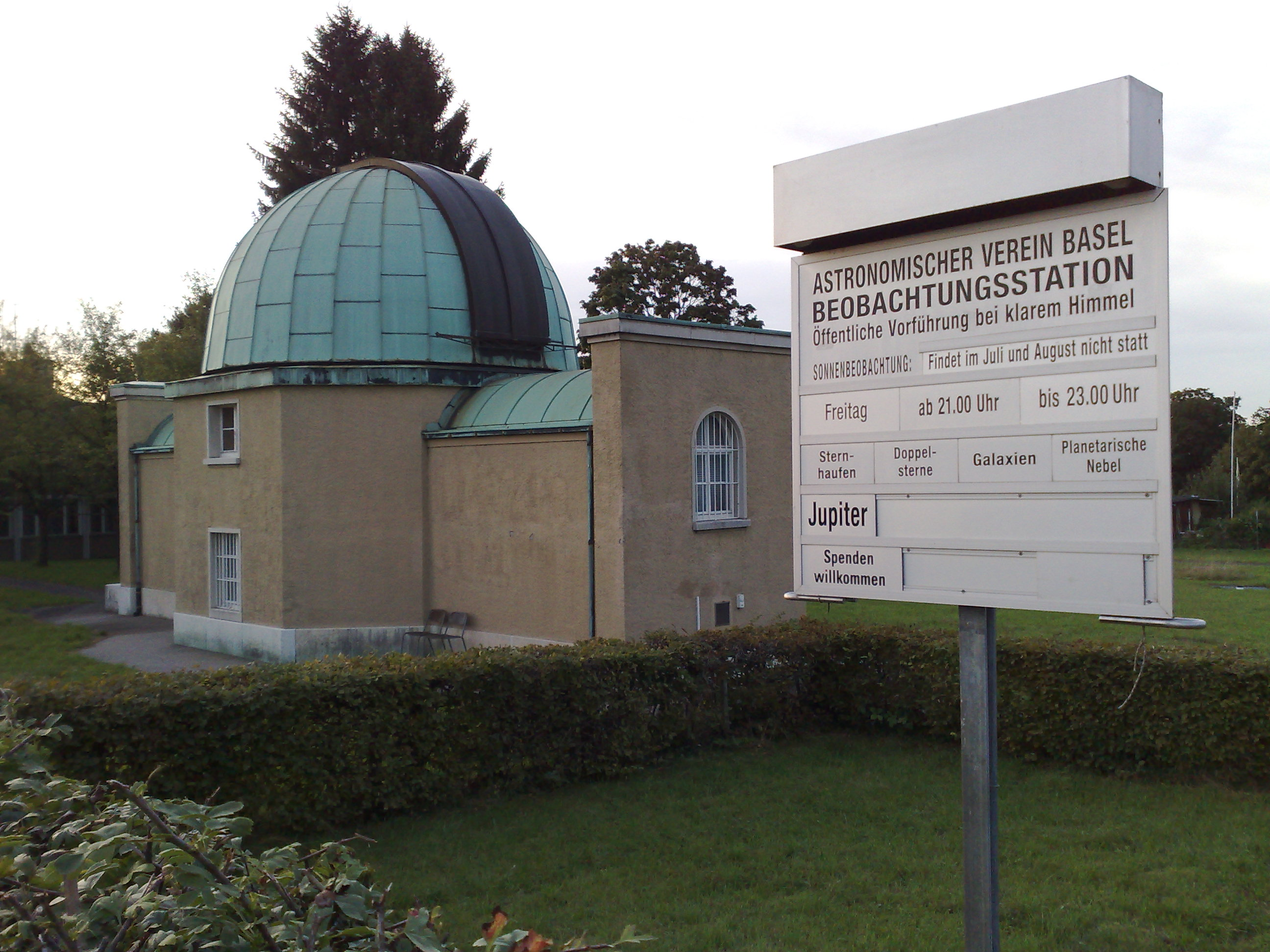 Sternwarte St. Margarethen, Binningen near Basel, Switzerland